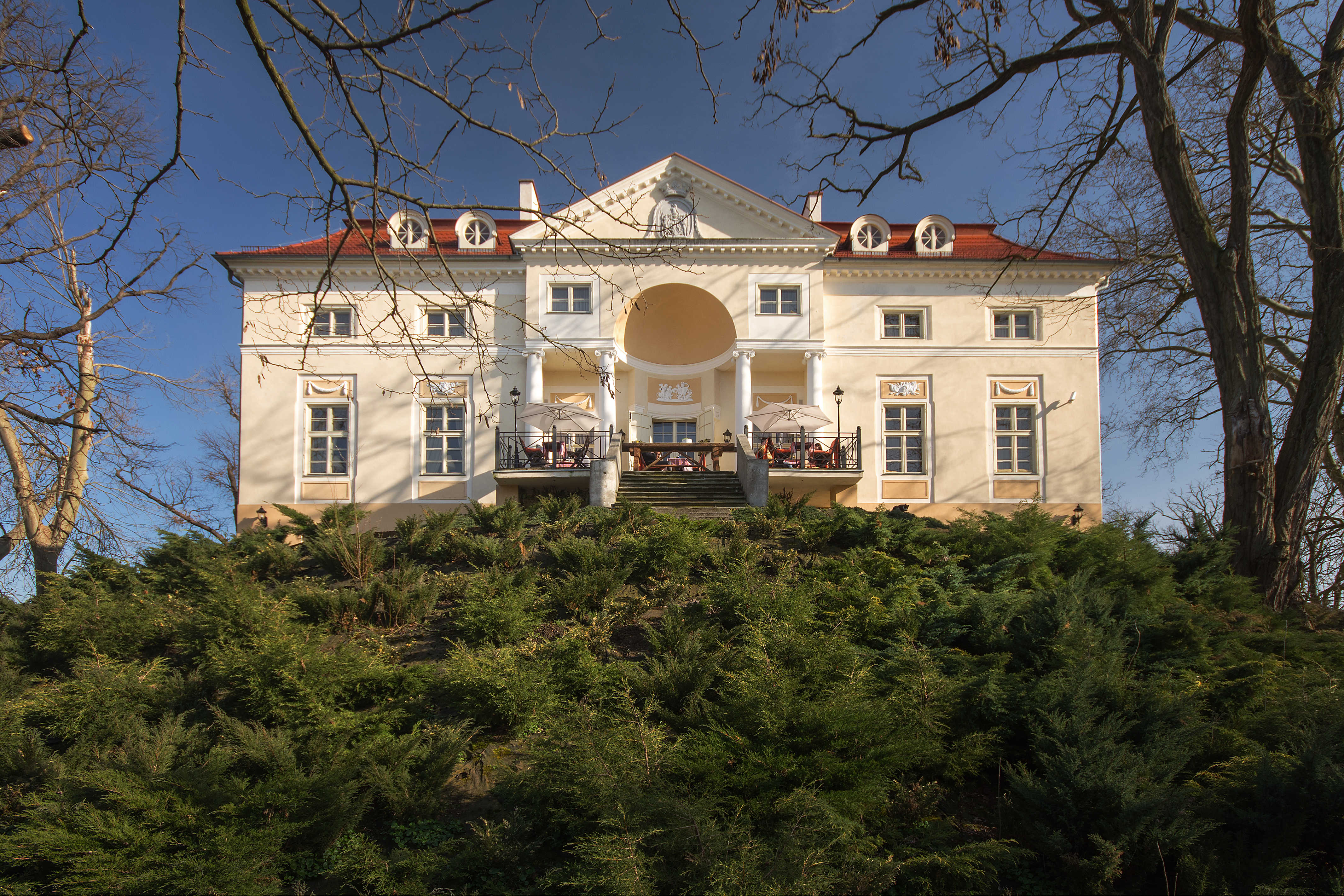 Samotwór, pałac, 1776-1781